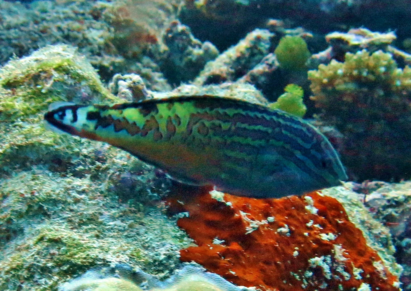 Un labre vermiculé (Macropharyngodon bipartitus) aux Maldives (atoll de Baa).